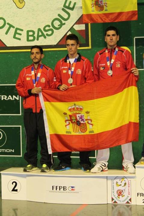 podium